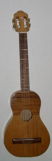 Cuatro (eigen foto) categorie:afbeelding muziekinstrument